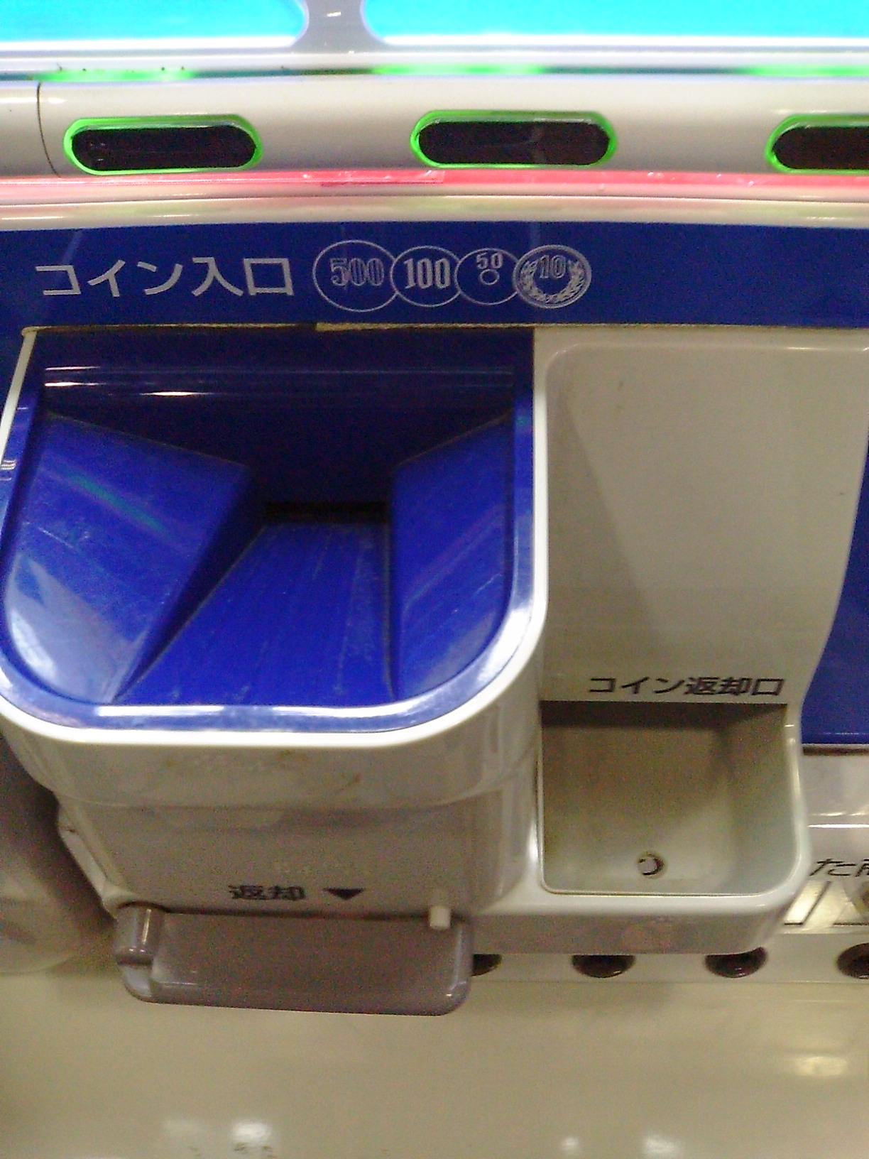 自動販売機のコイン投入口。